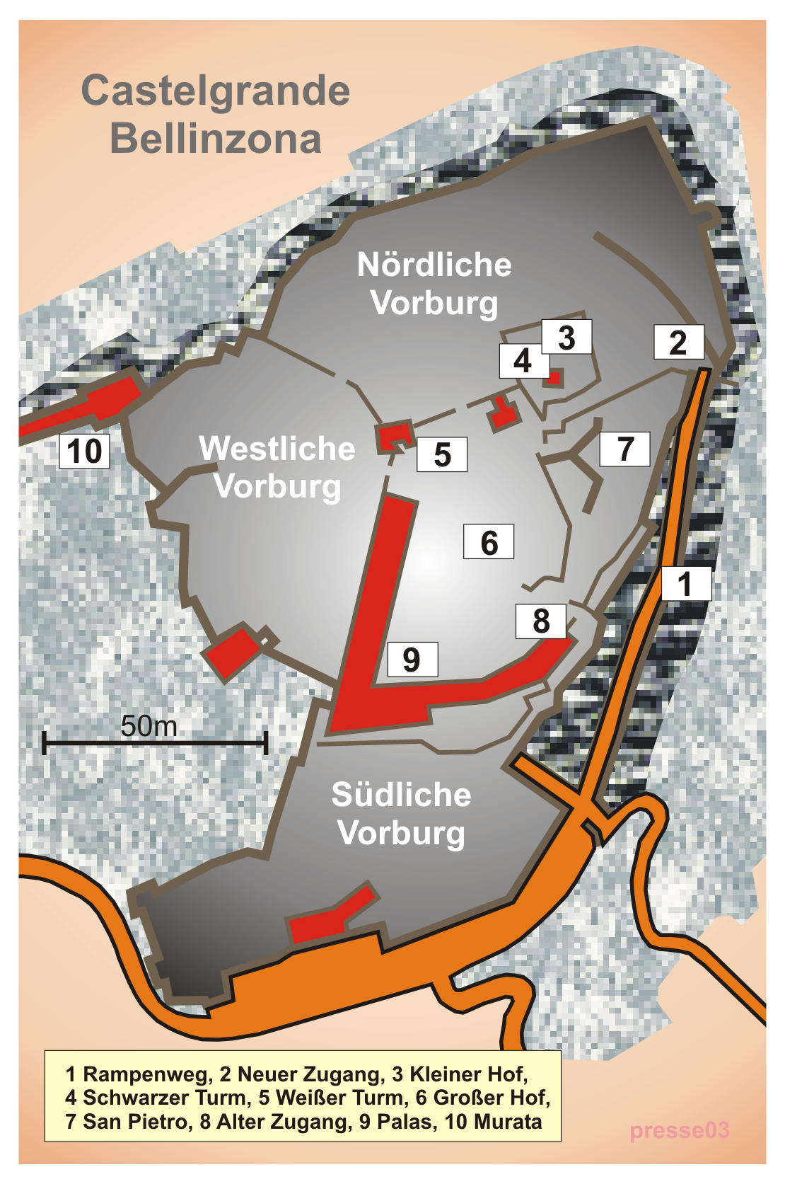 Plan des Castello Grande in Bellinzona, Tessin, Schweiz